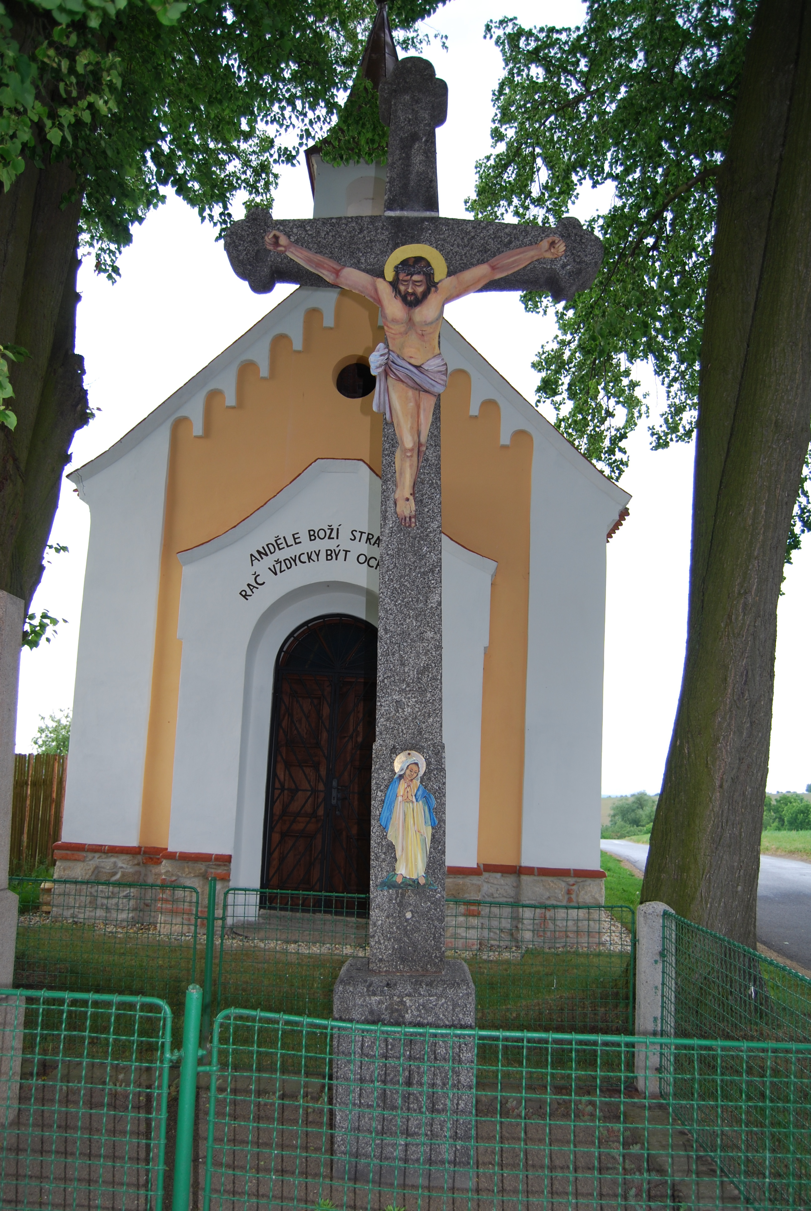 Kaple a kříž u cesty na obec Kluky v obci. Chrastiny (Dolní Novosedly). Okres Písek. Česká republika.